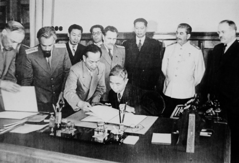 Подписание договора о дружбе и союзе между СССР и Китайской республикой в Кремле. С китайской стороны договор подписывает министр иностранных дел Ван Шицзе, справа от него стоят И.В. Сталин и В.М. Молотов.